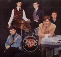 Los Shakers (banda española)